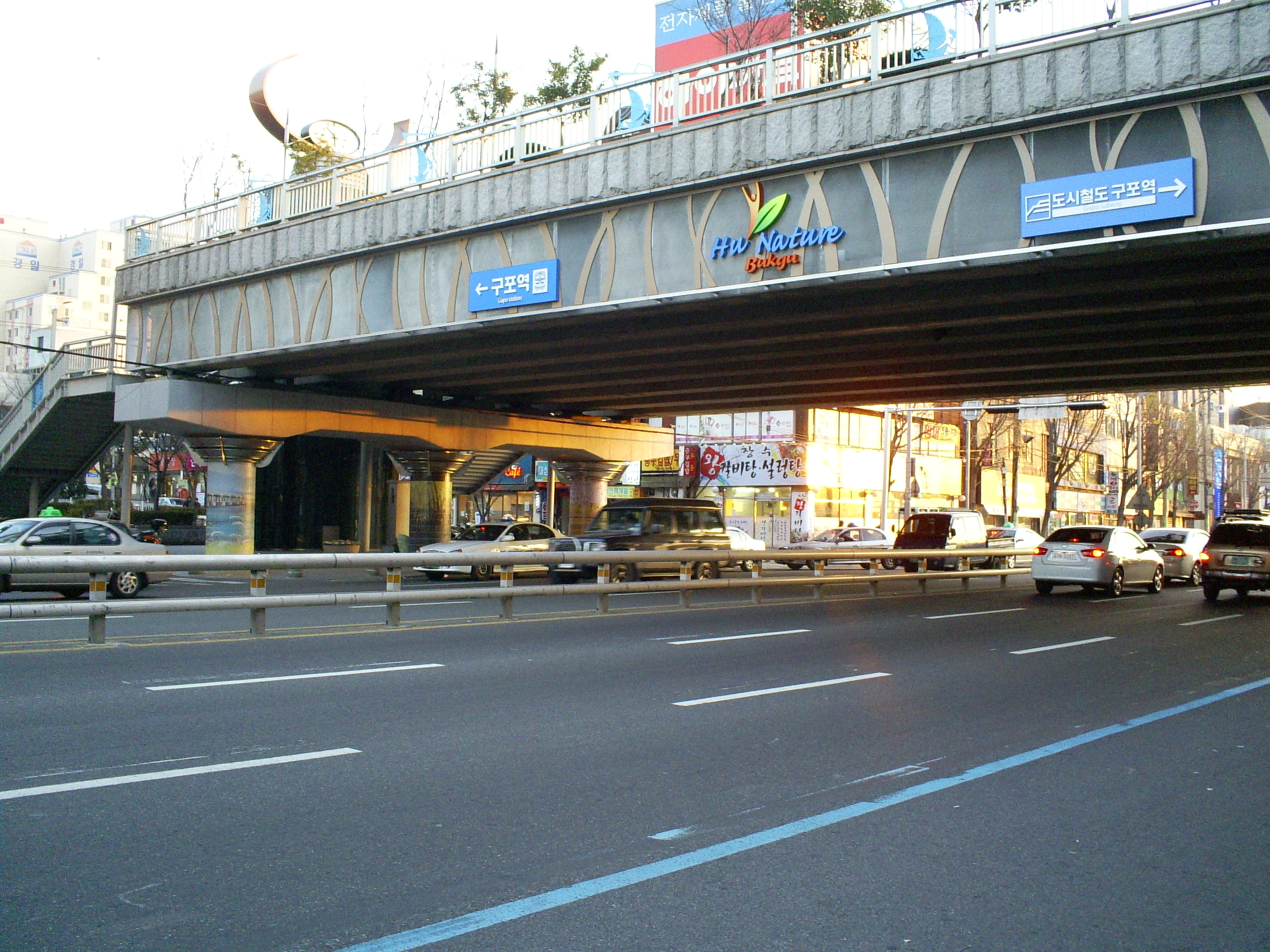 경부선 구포역과 부산 도시철도 3호선 구포역을 이어주는 육교 전경. 낙동대로 1700번지 부근.